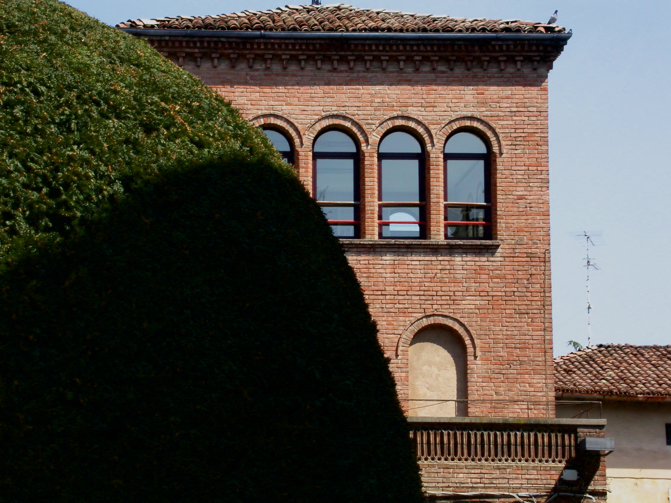 Le vetrate della vecchia sede della biblioteca di Scandiano. L'utimo piano era anche noto con il nome di "Torretta".